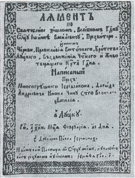 «Лямент»